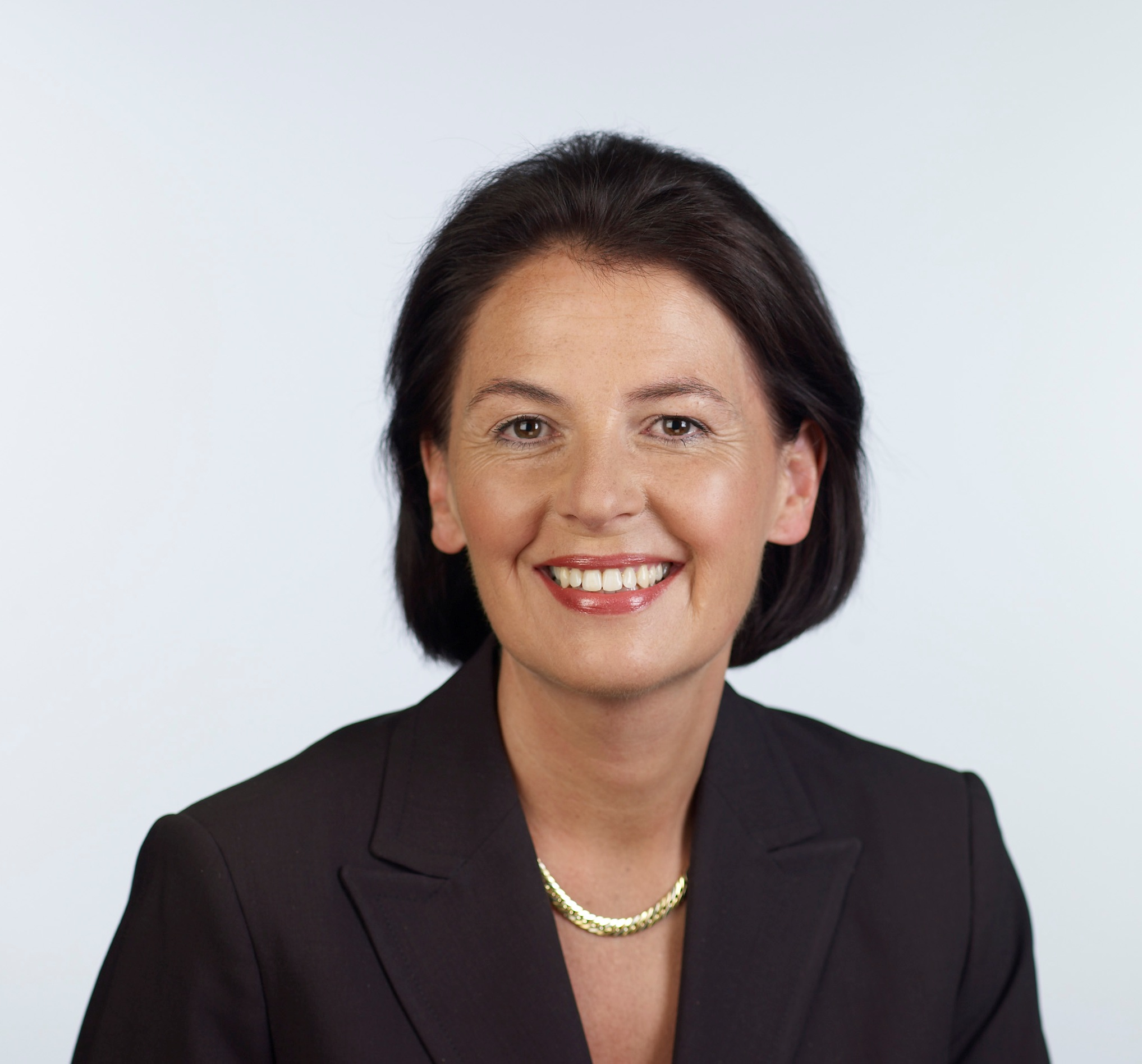 Portrait Dr. Rita Mohr-Lüllmann